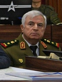 Министр обороны Сирии Али Абдулла Айюб